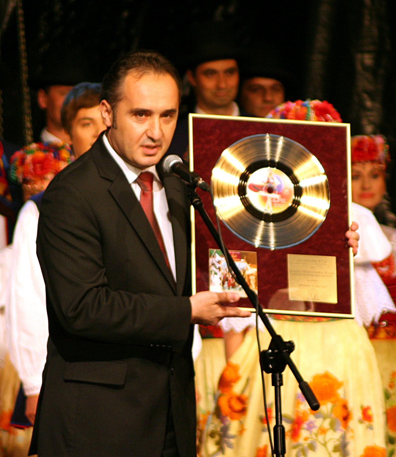 Zbigniew Cierniak odbierający złotą płytę Zespołu Pieśni i Tańca Śląsk w trakcie obchodów 58. rocznicy zespołu